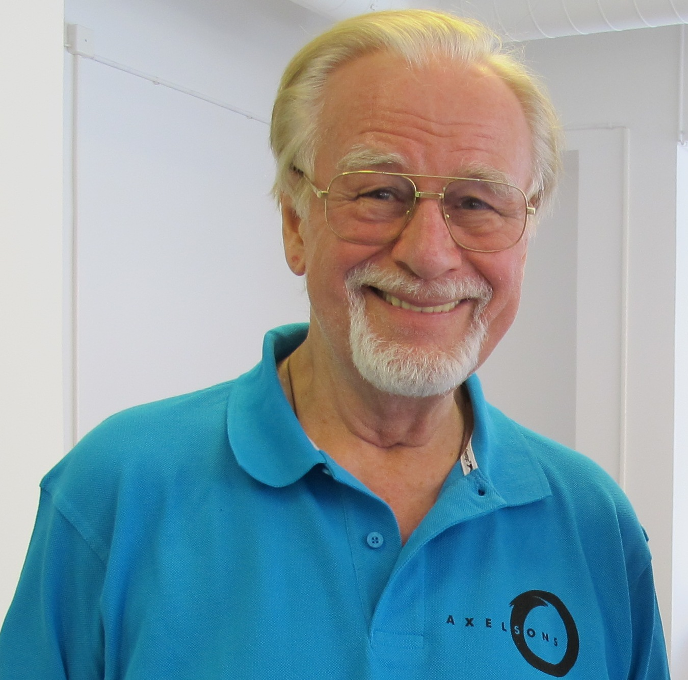 Hans Axelson 2013